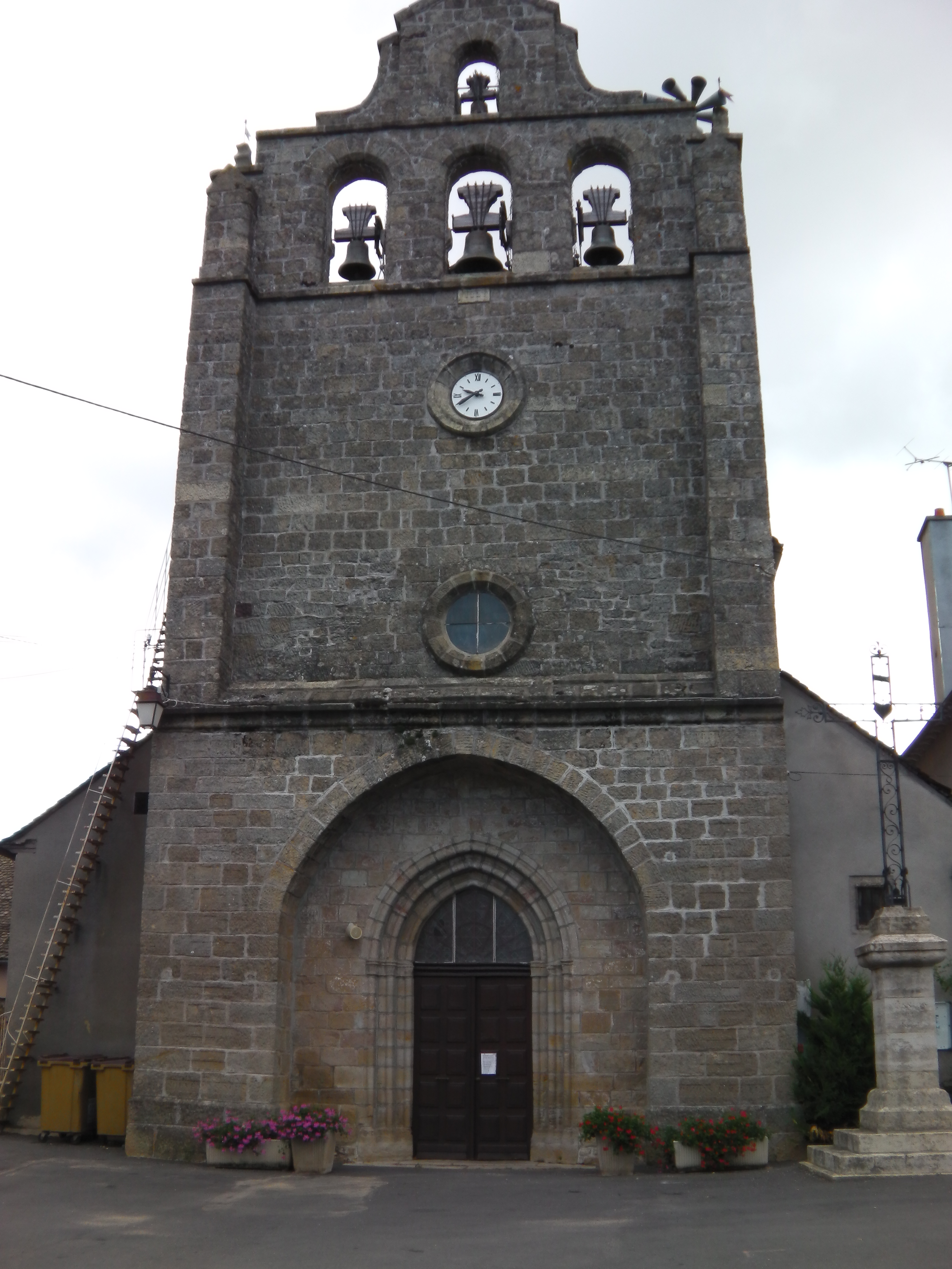 église paroissiale Saint-Germain de Saint-Germain-du-Teil (Lozère)